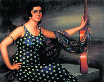 Pastora Imperio. 1922. Óleo y temple sobre lienzo. 95 x 110 cm.